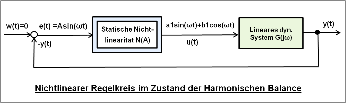 Nichtlinearer Regelkreis im Zustand der Harmonischen Balance